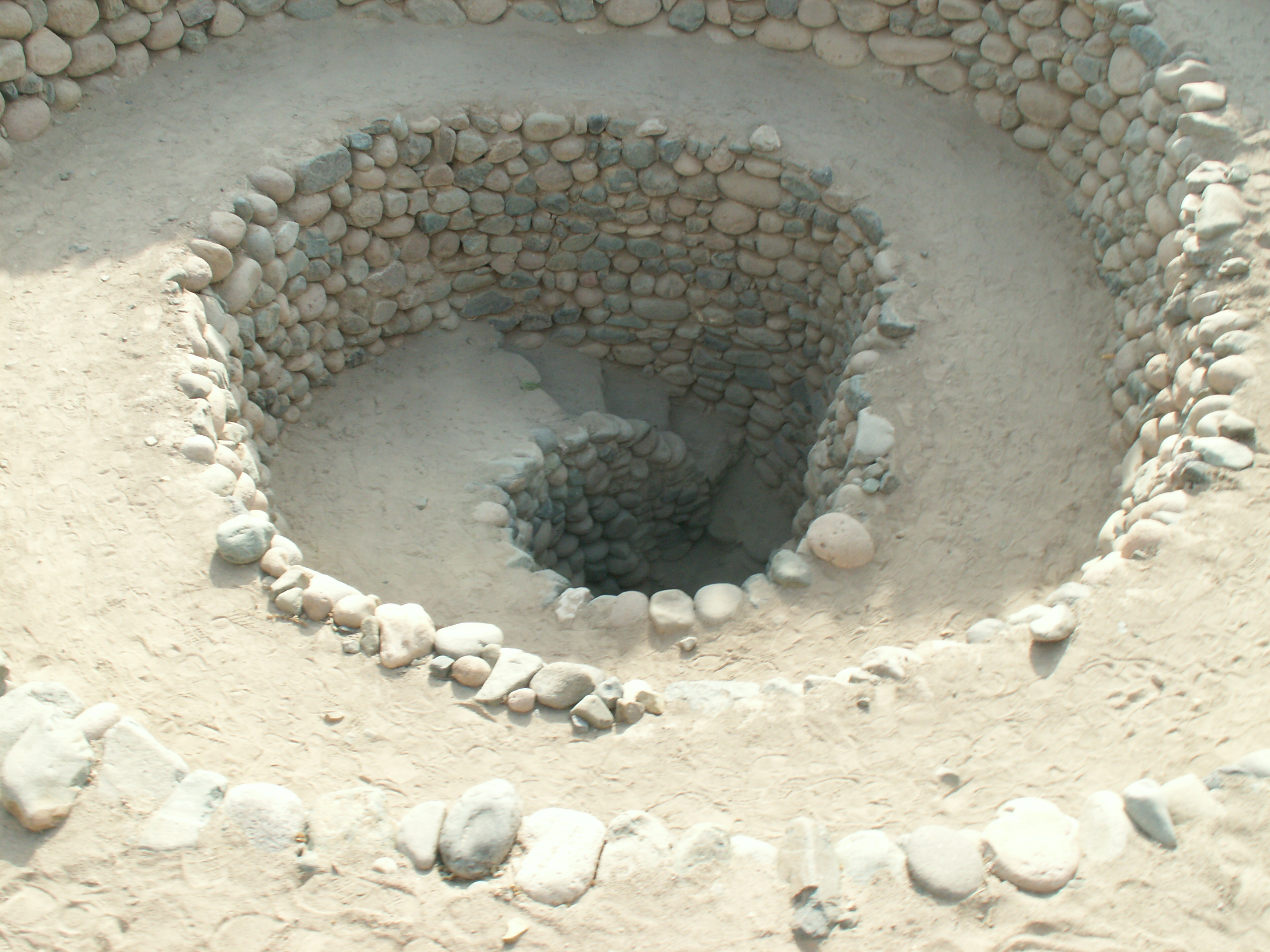 Nazca potery